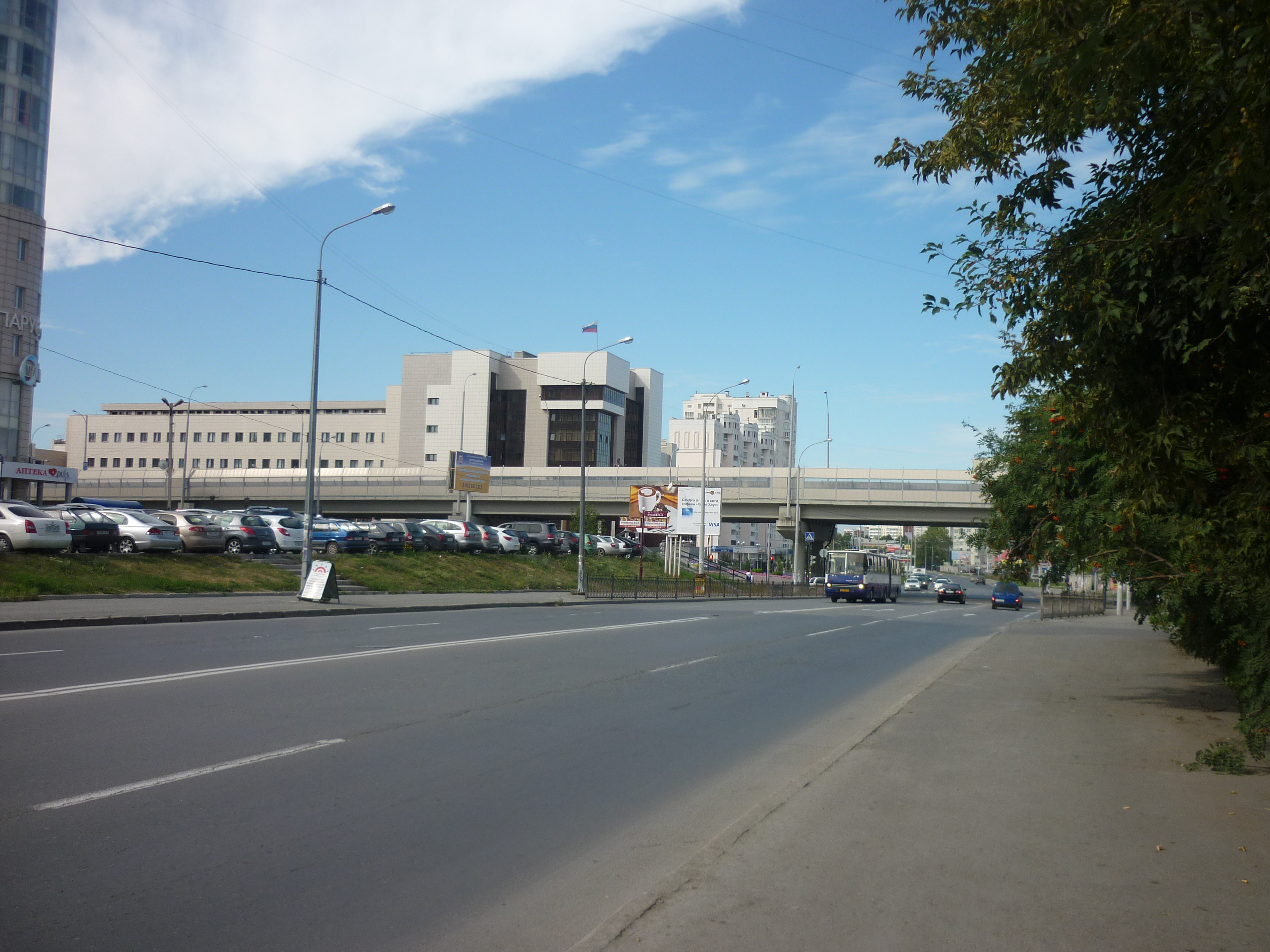 Дворец Правосудия, Екатеринбург. Вид с ул. Фурманова